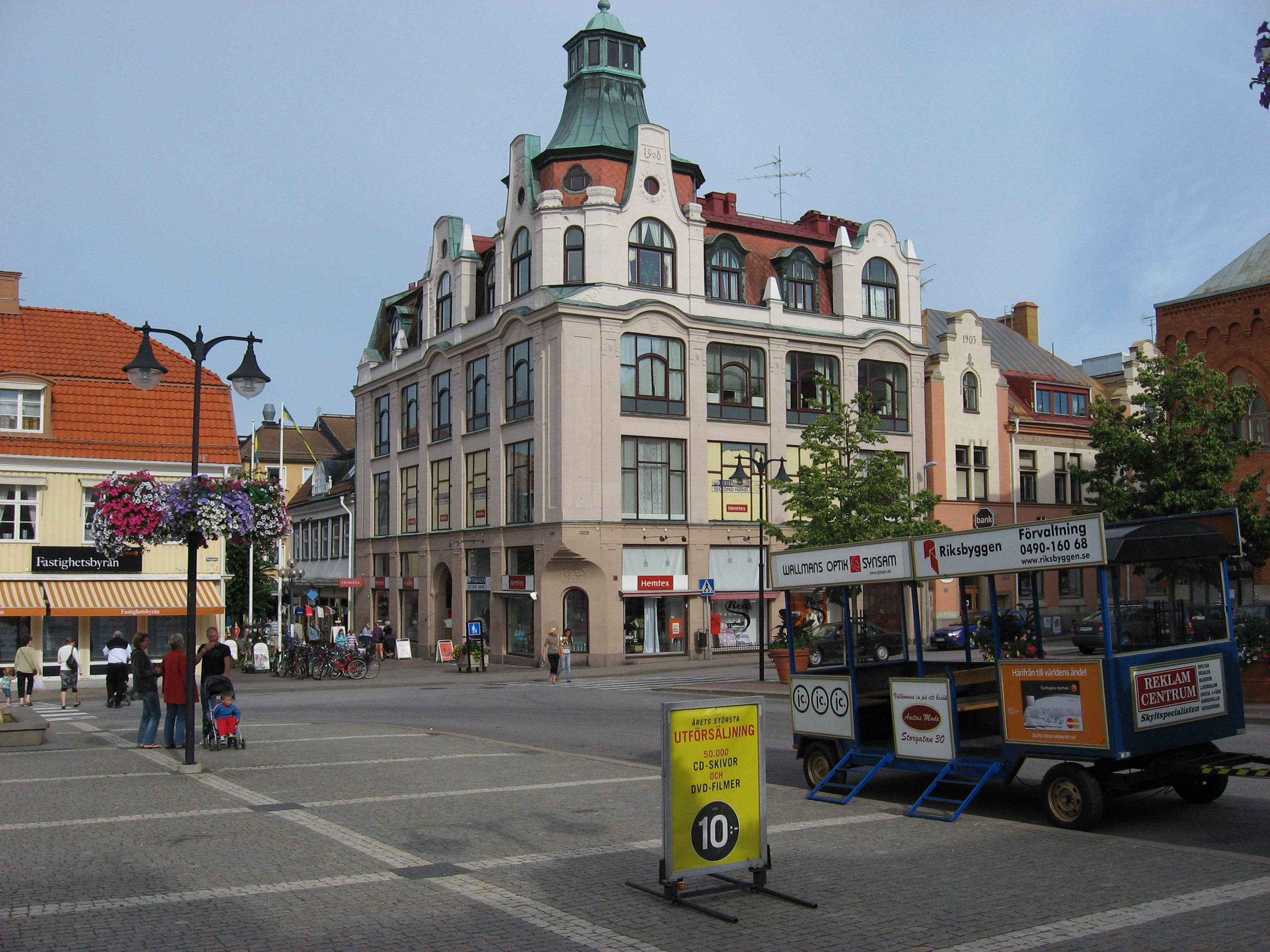 Stora Torget in Västervik, Sweden